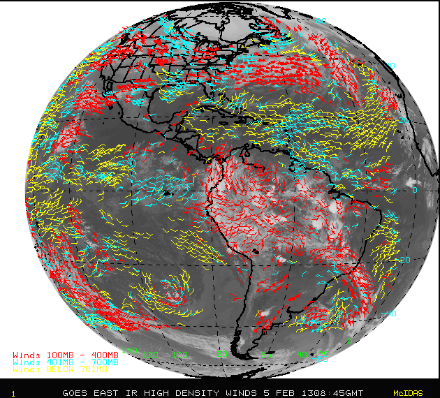 Imagen de satélite GOES (Satélite Geoestacional) mostrando el hemisferio occidental con el Océano Pacífico al oeste, el Atlántico al Este, con el continente americano en el centro. Sobre una imagen de radar (para eliminar los problemas de la oscuridad nocturna de la imagen visible) se indican la velocidad y dirección de los vientos en tres niveles: 1. Baja altitud en color amarillo (más de 701 mb). 2. Altitud media, en azul (entre 401 y 700 mb) y 3. Vientos en altura, en rojo (entre 100 y 400 mb). La velocidad relativa se indica con las rayitas de cada flecha.